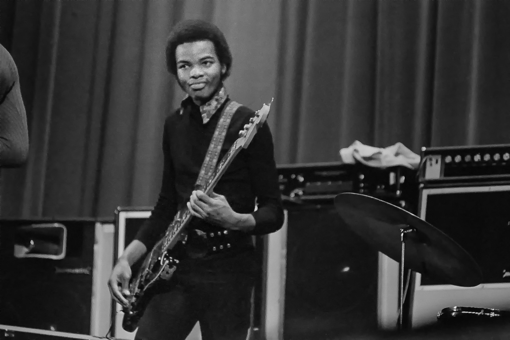 Miles Davis Septet, Sigma 7, 1971